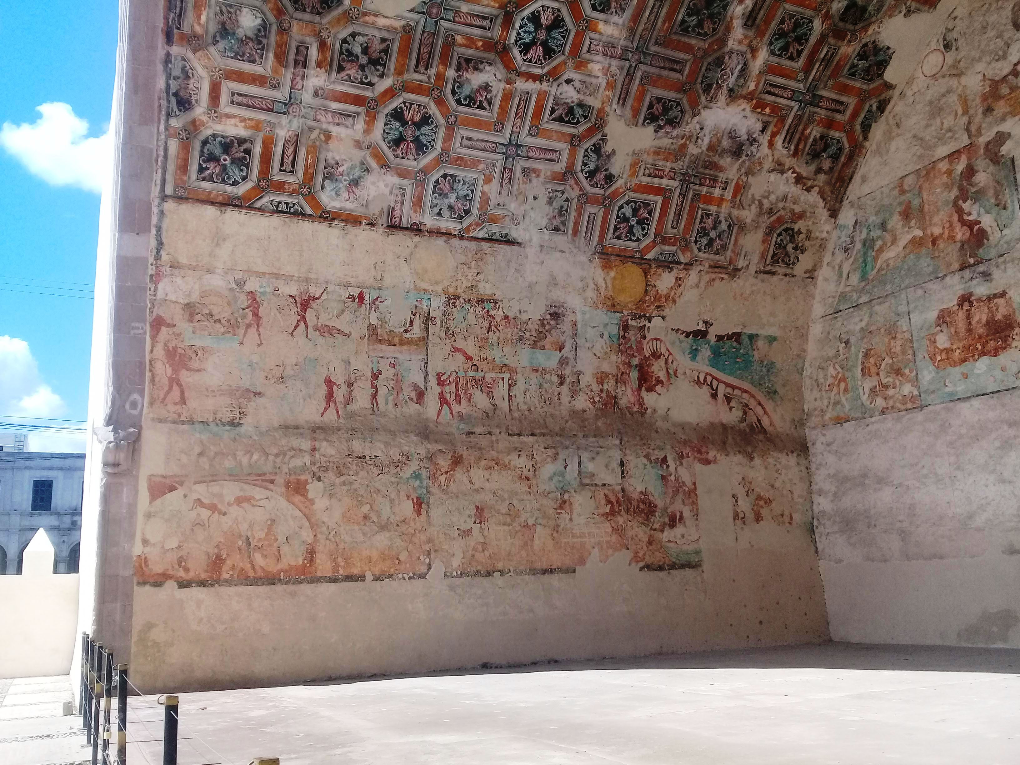 Templo y exconvento de San Nicolás de Tolentino (Actopan).